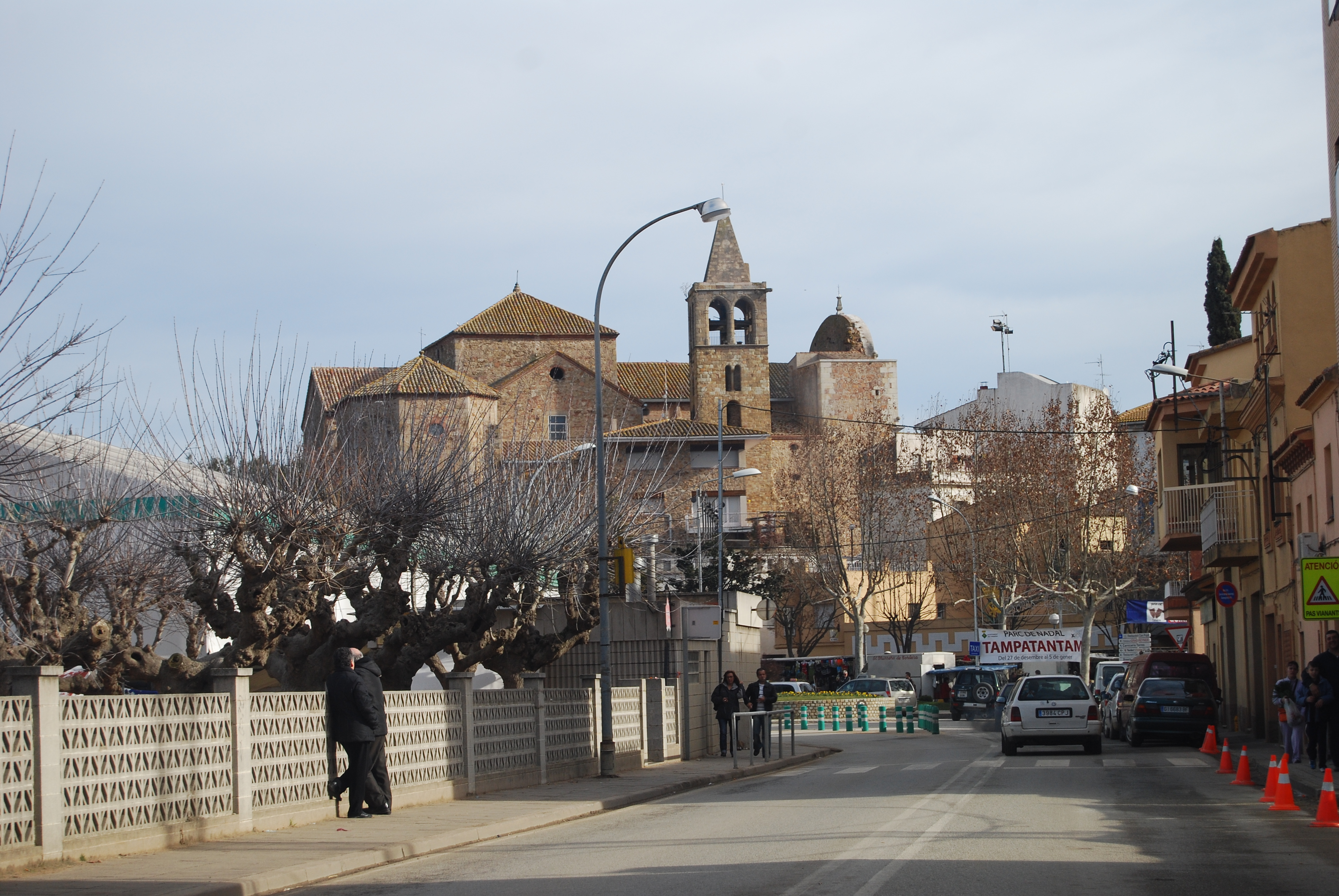 Tordera amb l'església de Sant Esteve i el seu campanar romànic